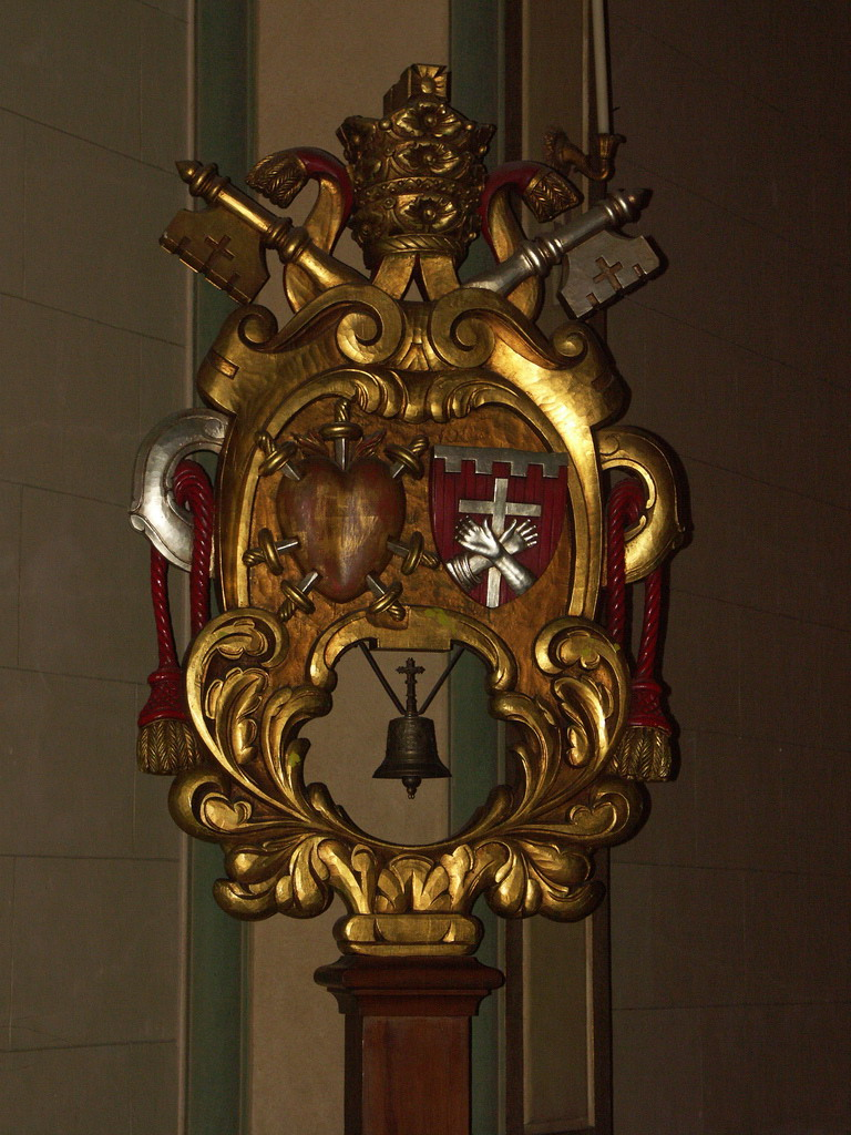 Tintinnabulum de la Mission San Francisco de Asís, San Francisco, californie